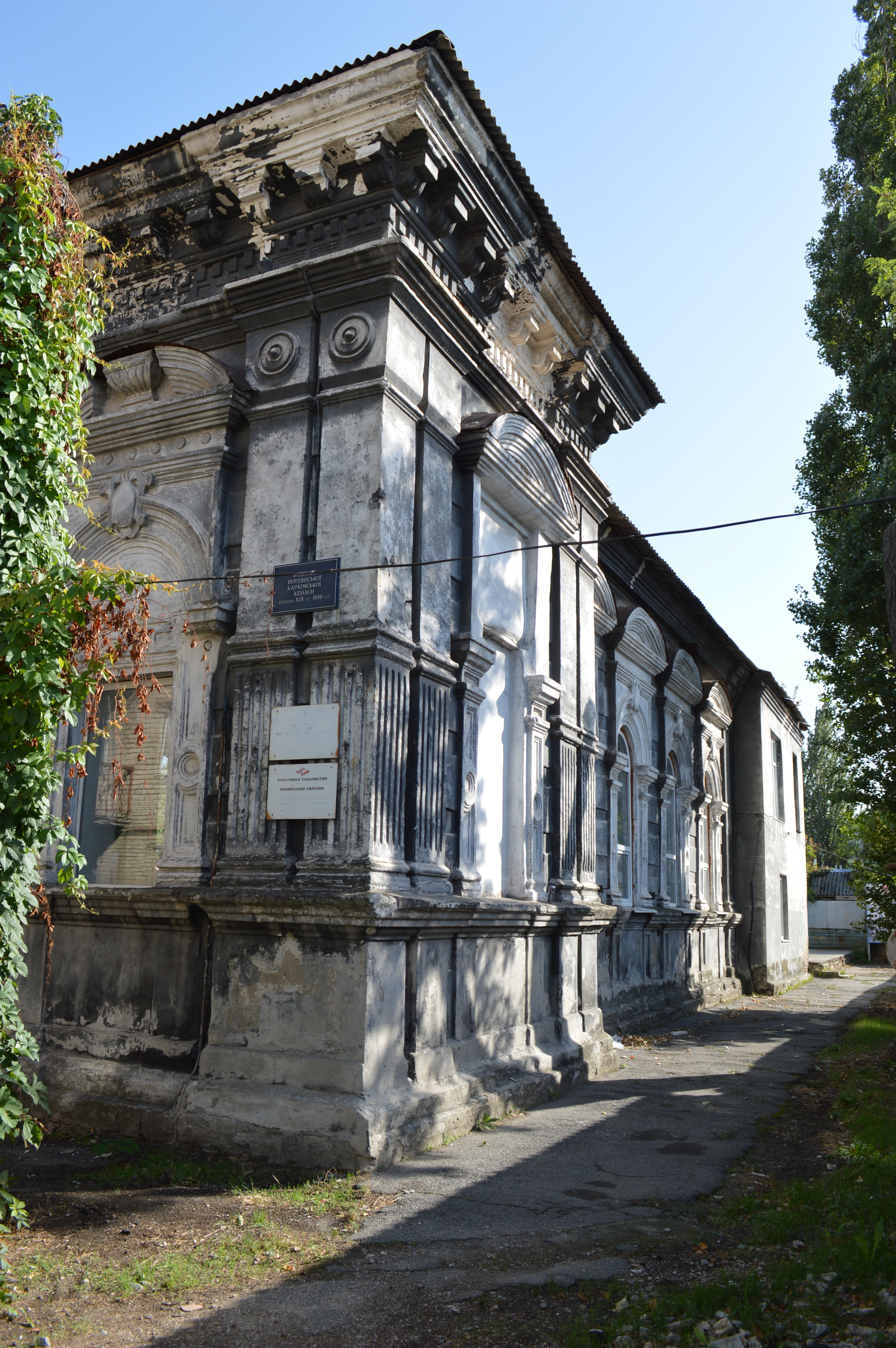 Караїмська кенаса, Бердянськ, вул. Земська (Красна), 16